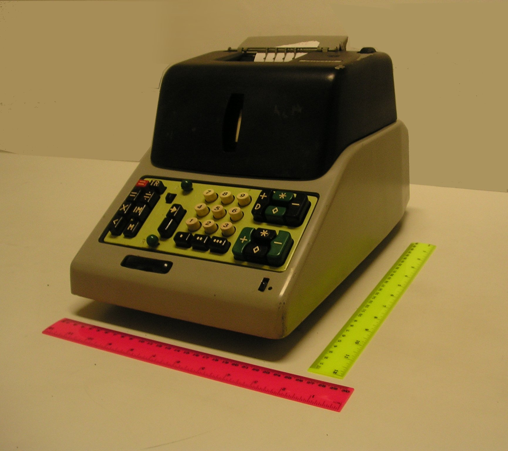 Olivetti MC24 - Modello Tetractys